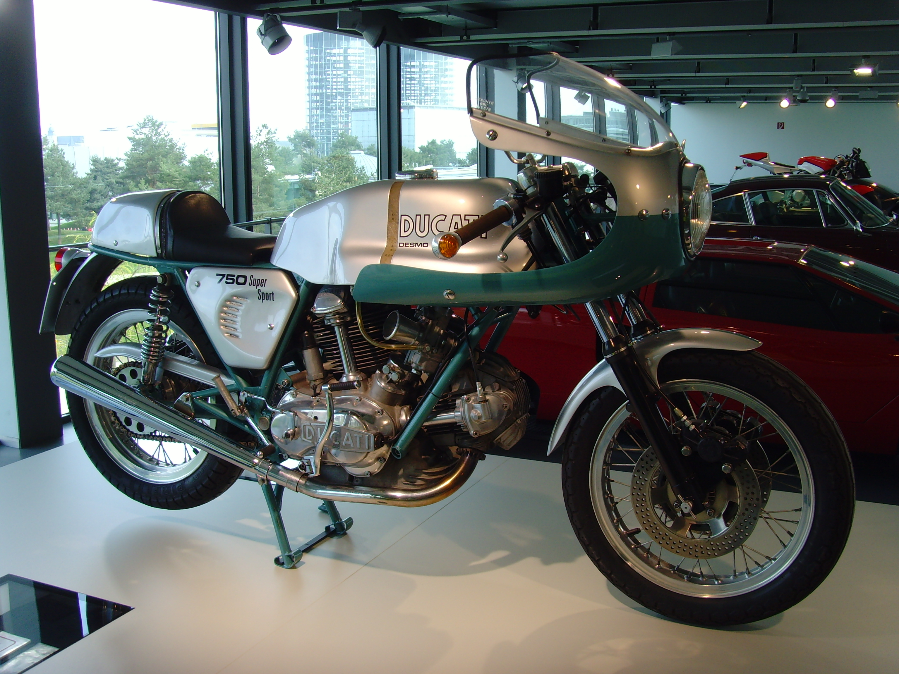 Autostadt Wolfsburg - motorrad ikonen - Ducati 750 Super Sport Desmo 1974 1